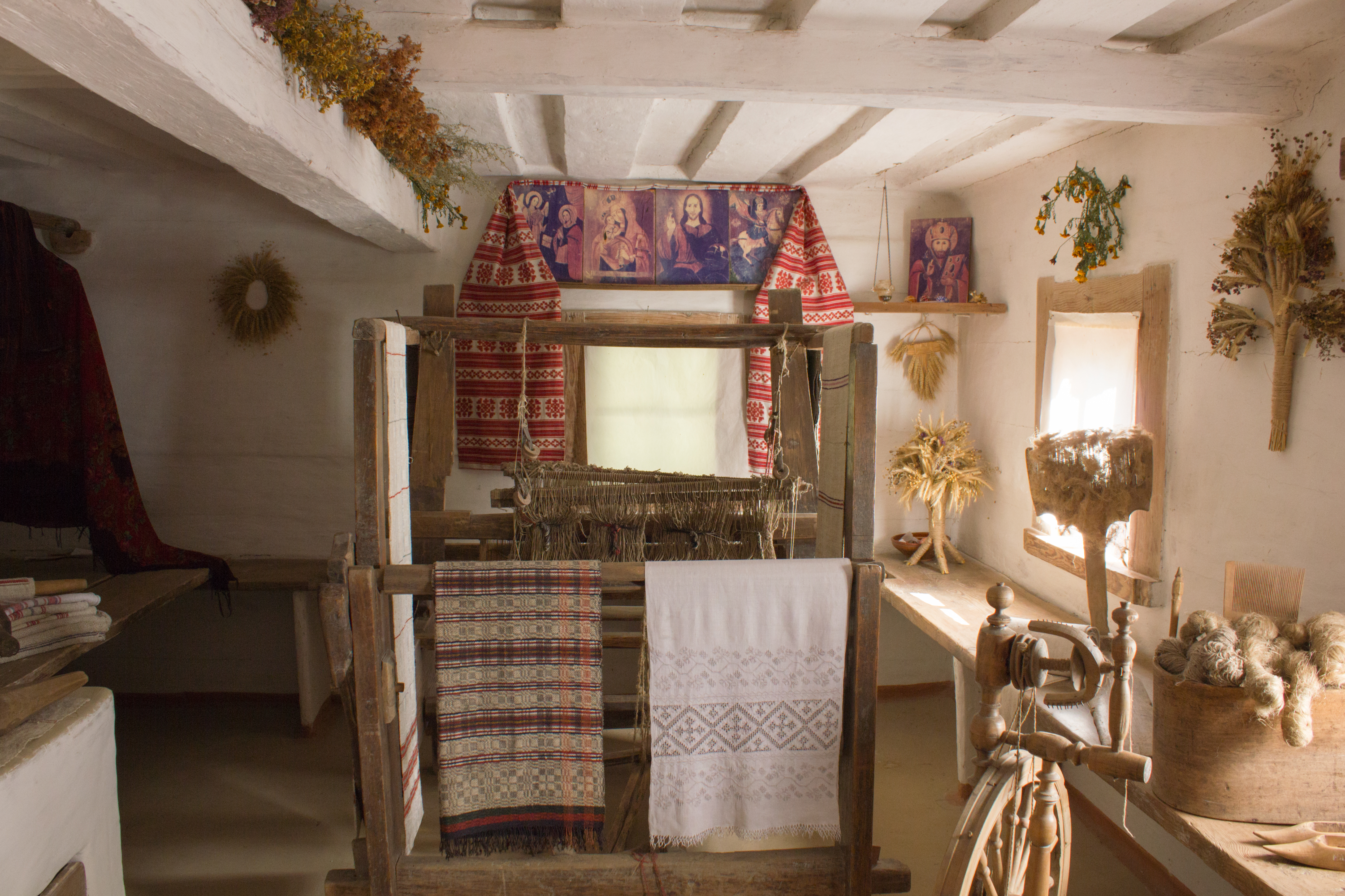 Хата з села Яснозір'я Черкаського району Черкаської області з садиби № 1., Київ, Пирогів